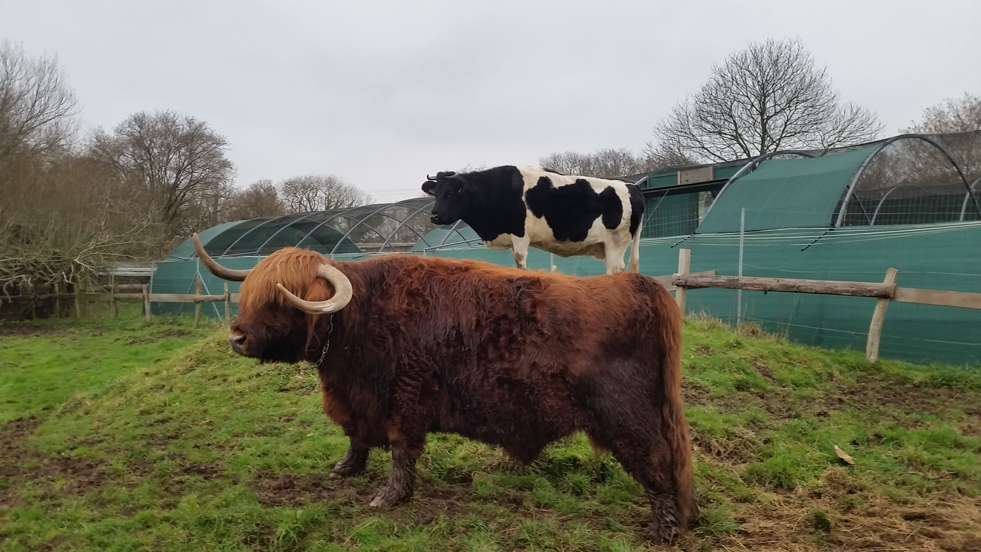 Deux pensionnaires permanents et une des volières du centre de sauvegarde des animaux Volée de piafs, à Languidic dans le Morbihan, en décembre 2018